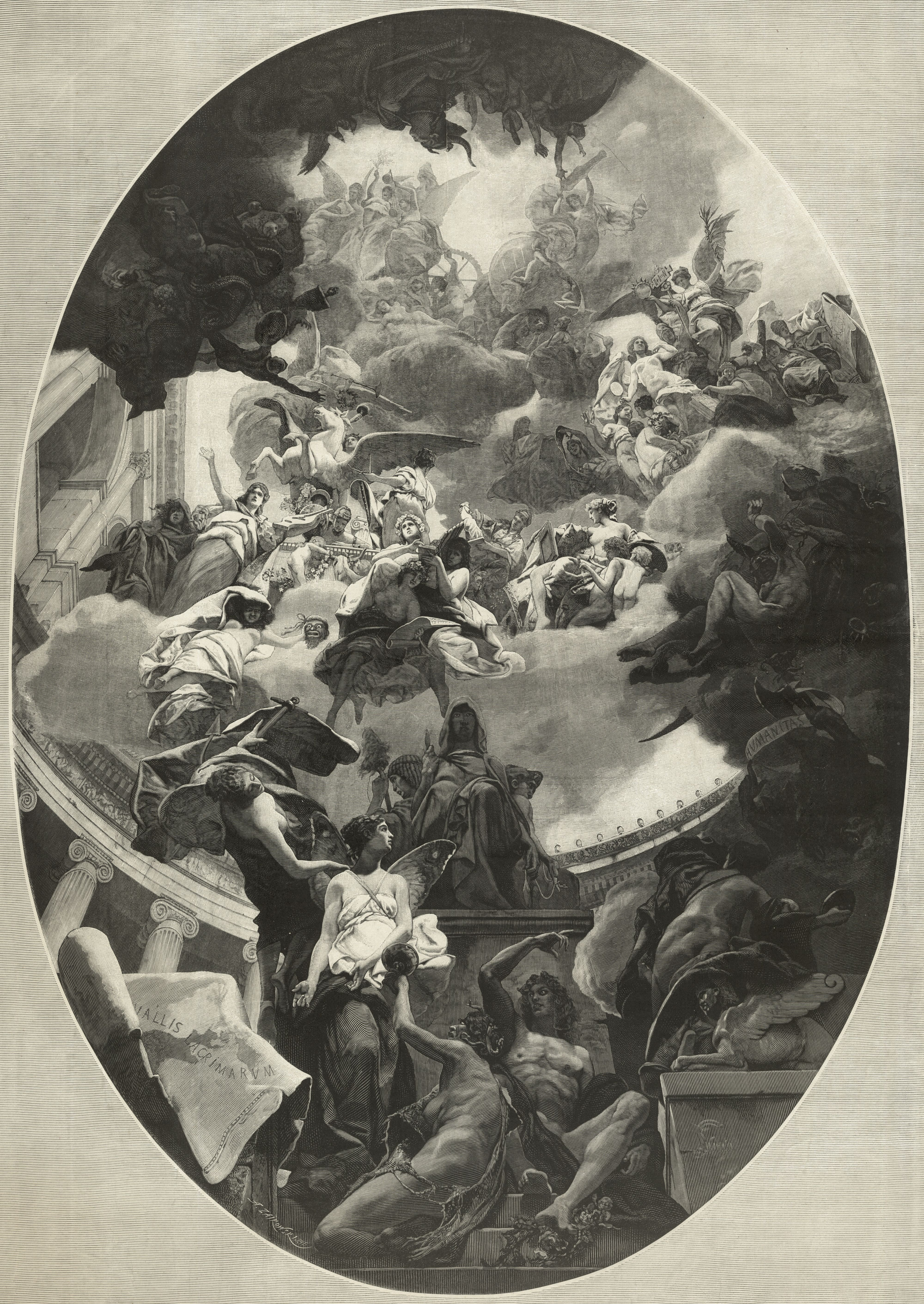 "Światło i ciemność : malowidło stropowe Henryka Siemiradzkiego, zdobiące przedsionek pałacu p. Jana Zawiszy w Warszawie" (drzeworyt sztorcowy)